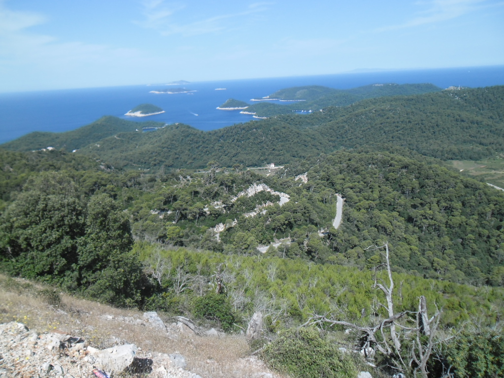 otok Lastovo